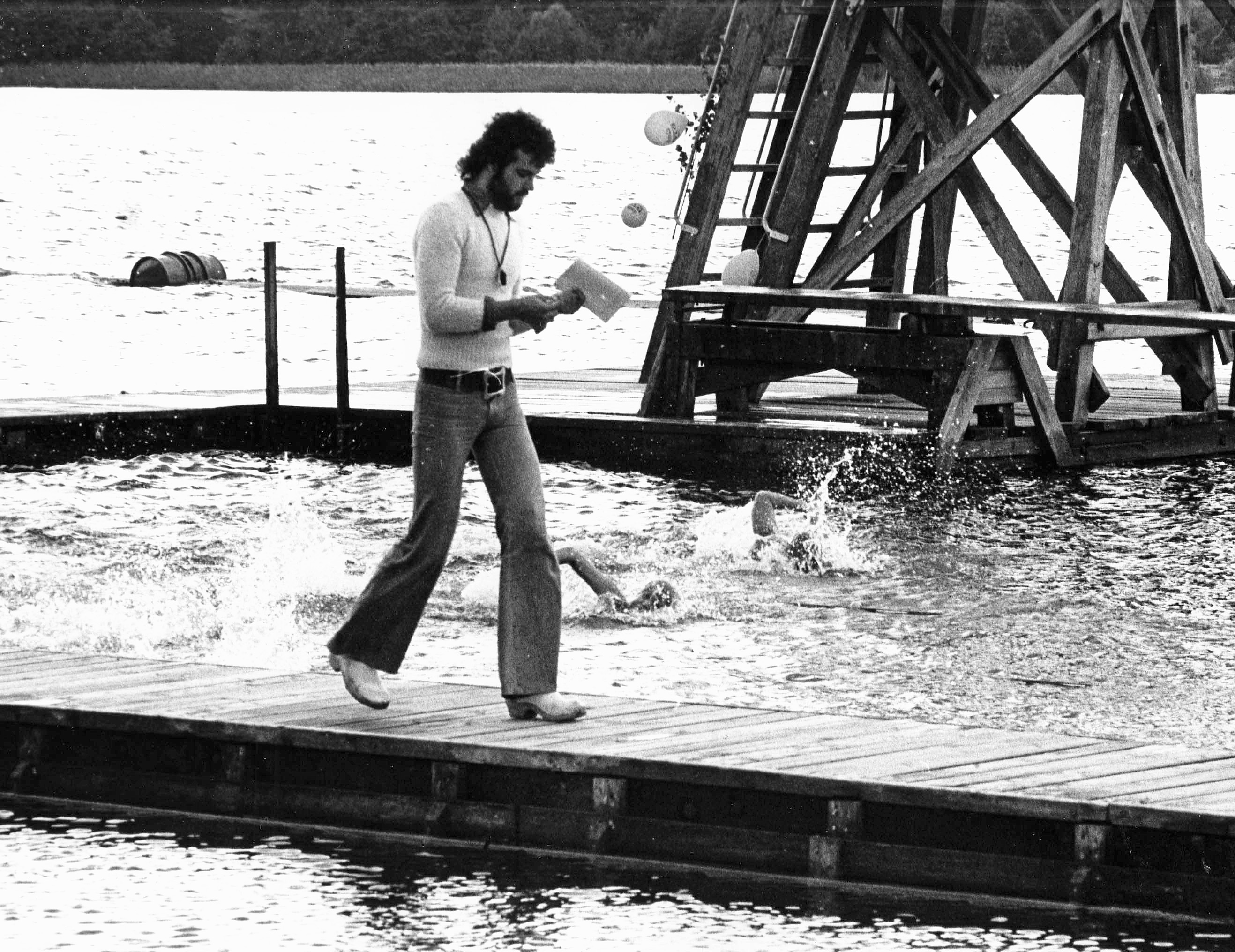 Kanaanbadet: Simma på tid? Simundervisning 1969.